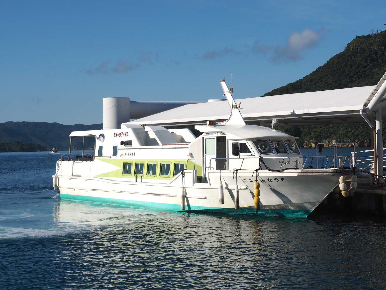 船浮海運のニューふなうき（沖縄県八重山郡竹富町西表島白浜港にて）